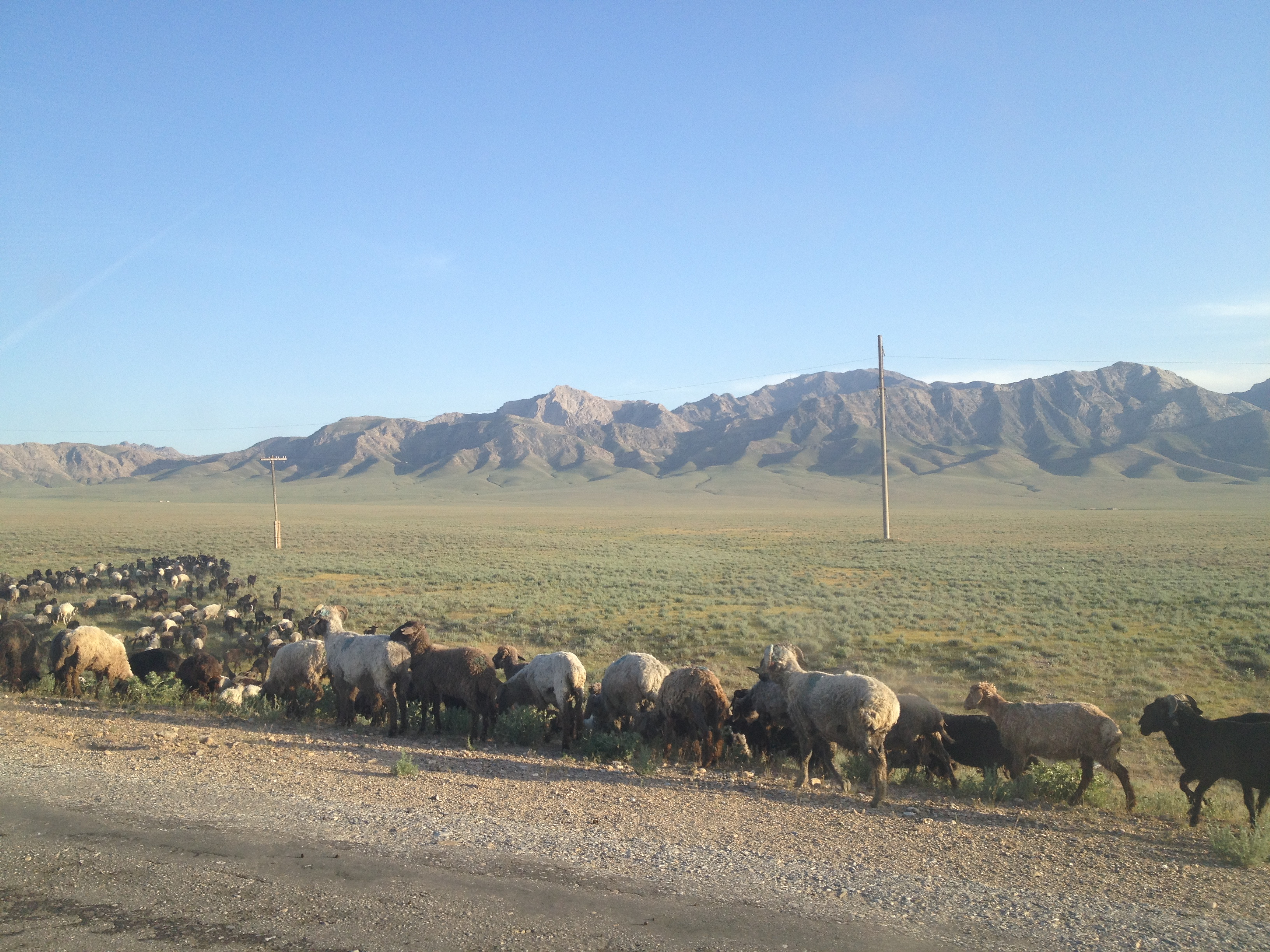 Отара овец в Нуратинской депрессии. На горизонте - горы Актау